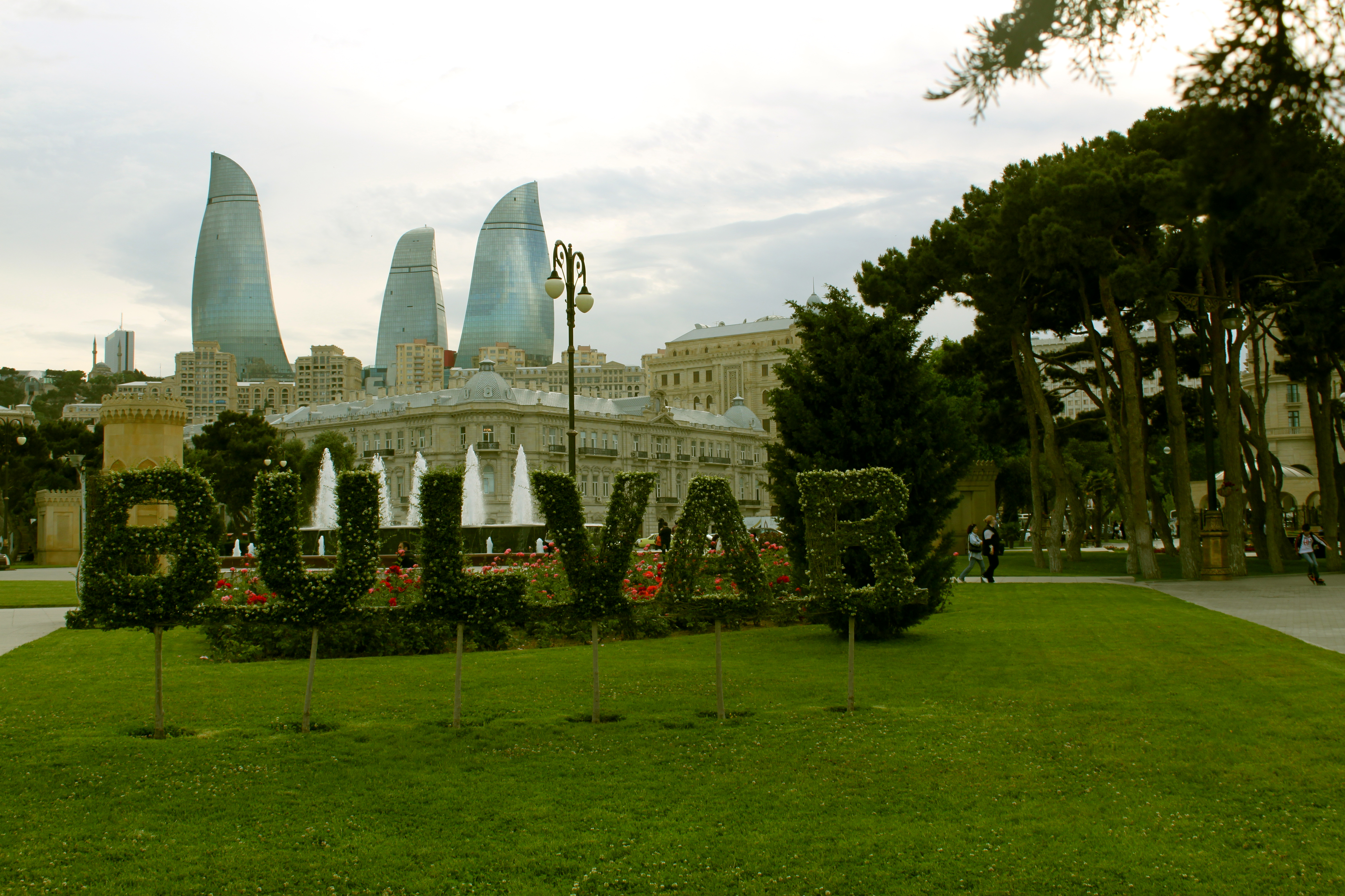 Dənizkənarı bulvarı